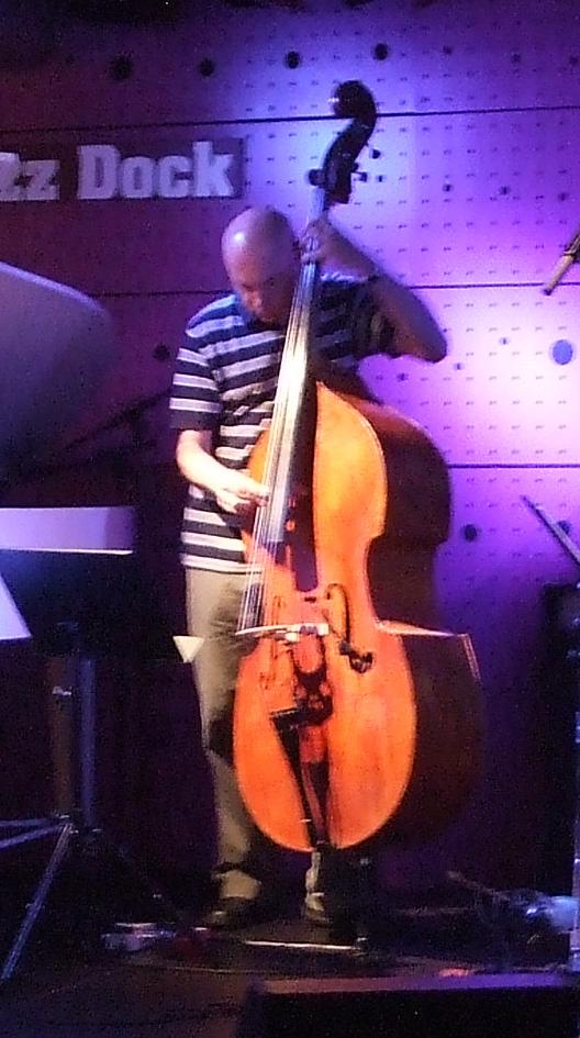 Der tschechische Bassist Jaromir Honzak beim Konzert mit dem Kristan-Trio im Jazzdock in Prag